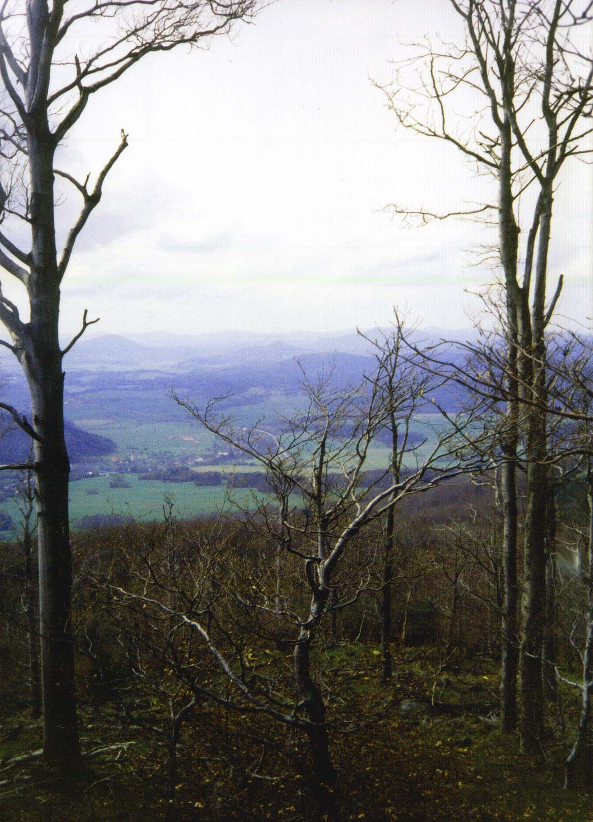 Blick vom Großen Kalkberg (Velky Vápenný) in Richtung Jítrava (für die GNU-FDL)